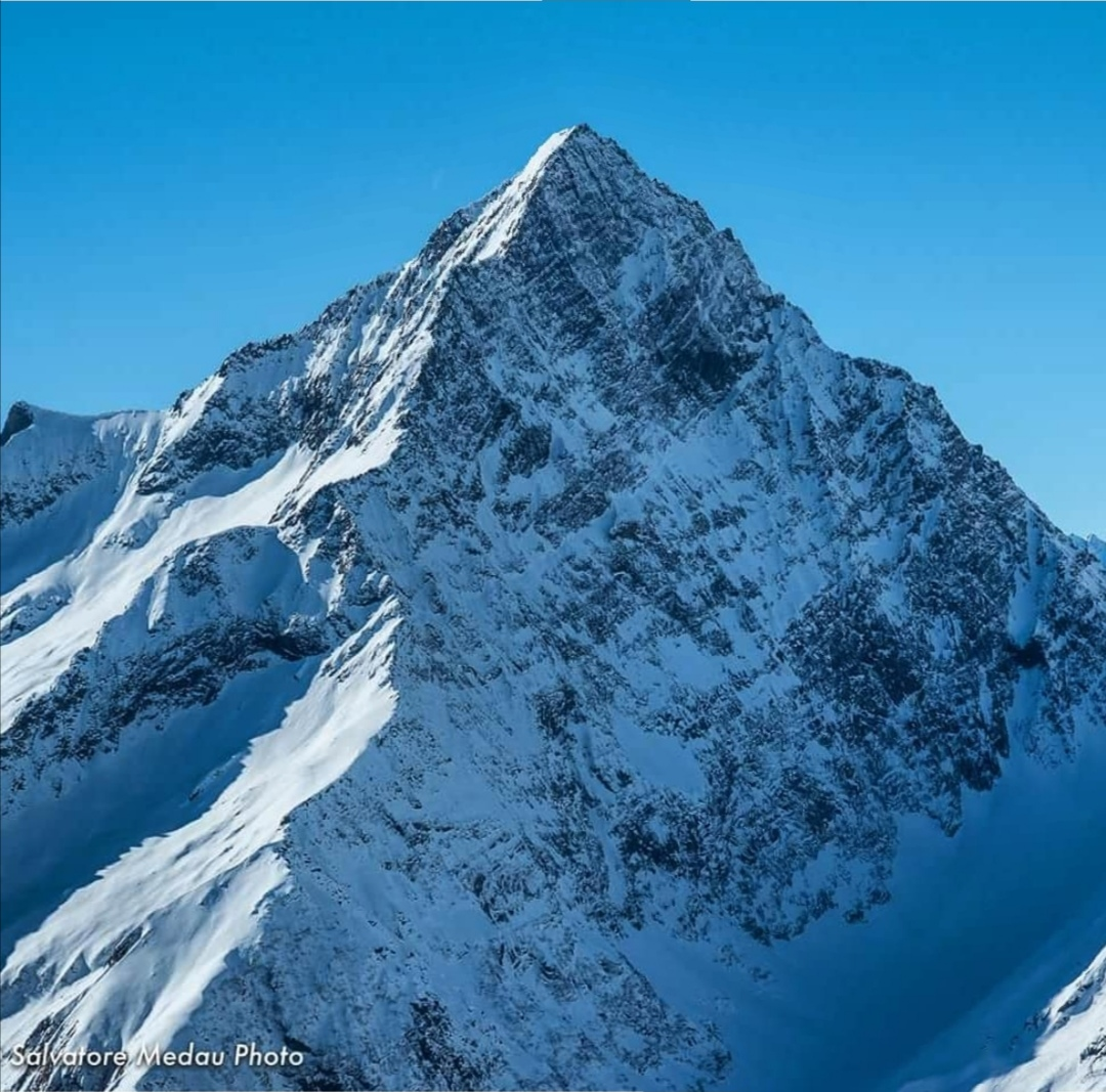 Il Monte Tagliaferro è una cima situata in Valsesia, nelle Alpi Pennine, è alta 2964 m ed è una delle vette più importanti della valle.